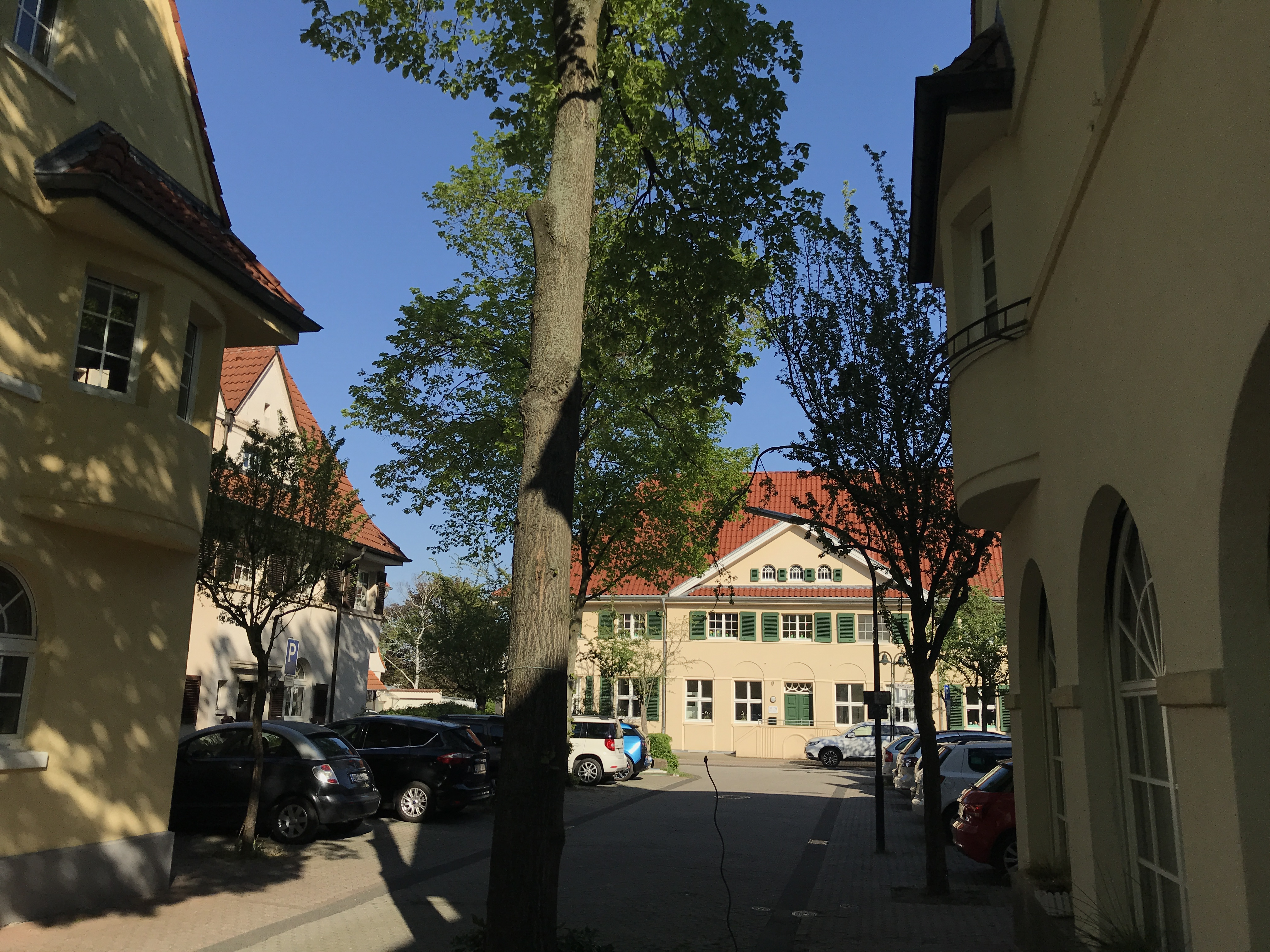 Rote Kolonie, Bismarkplatz